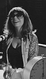 Ellen Jens in 1974, tijdens opnames van de Van Oekels Discohoek